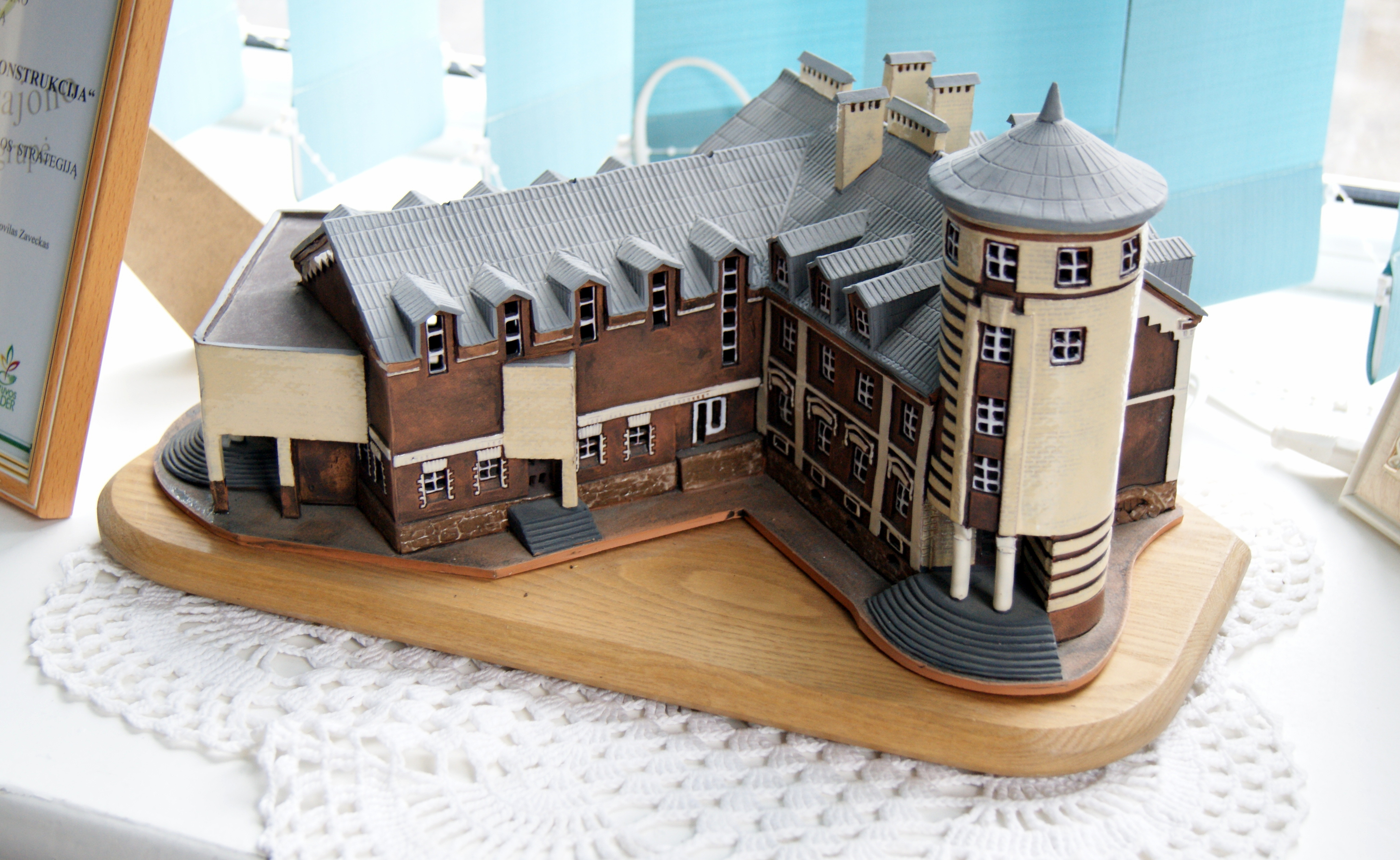 Modell des Schlosses von Ginkunai, Litauen